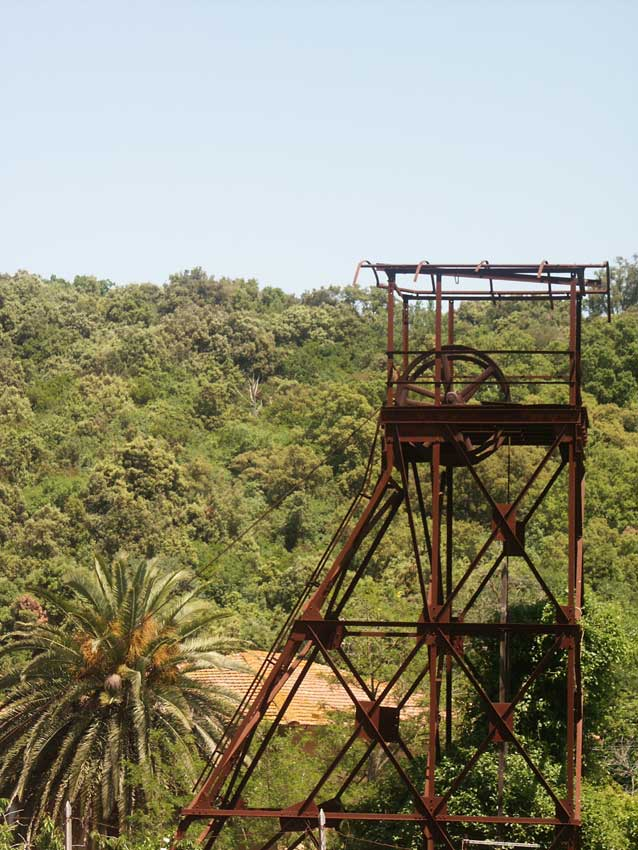 Ravi Marchi Parco Tecnologico Archeologico Colline Metallifere Grsossetane